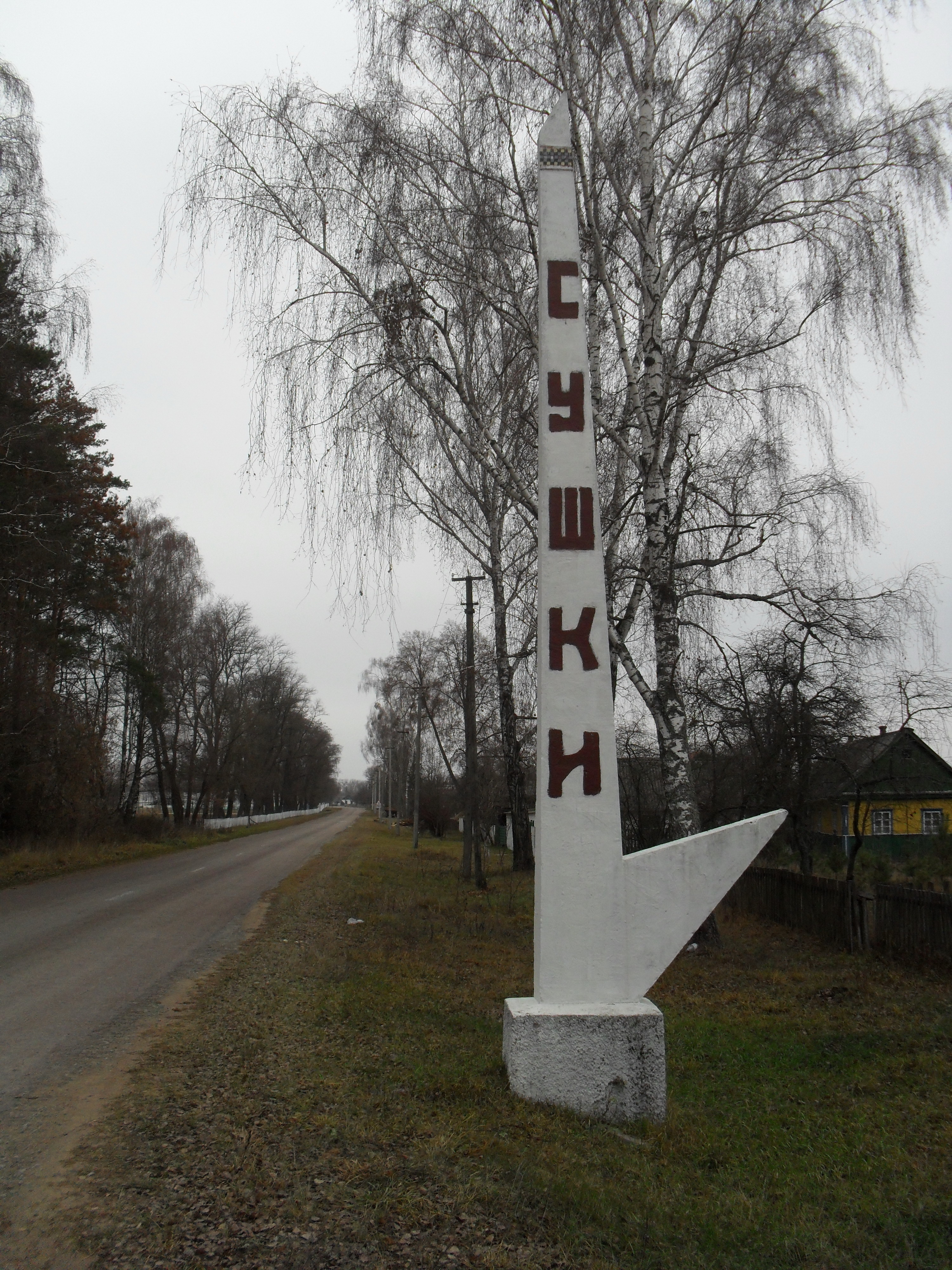 В'їзний знак до с. Сушки